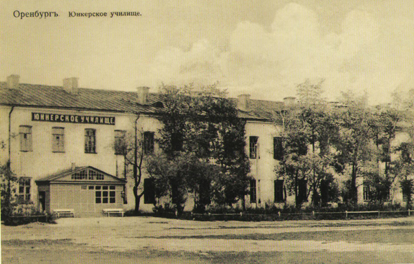 Фасад здания